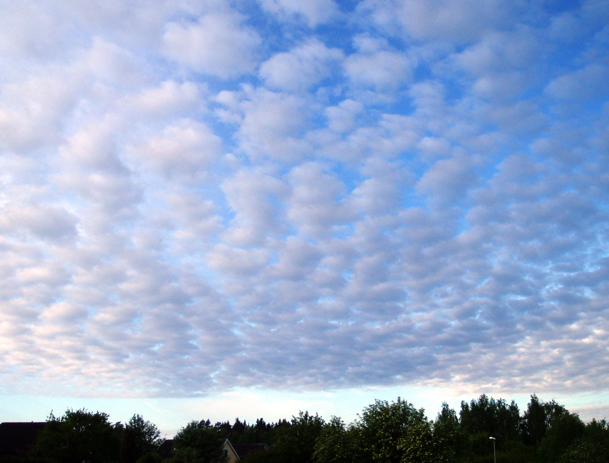 Altocumulus stratiformis perlucidus clouds